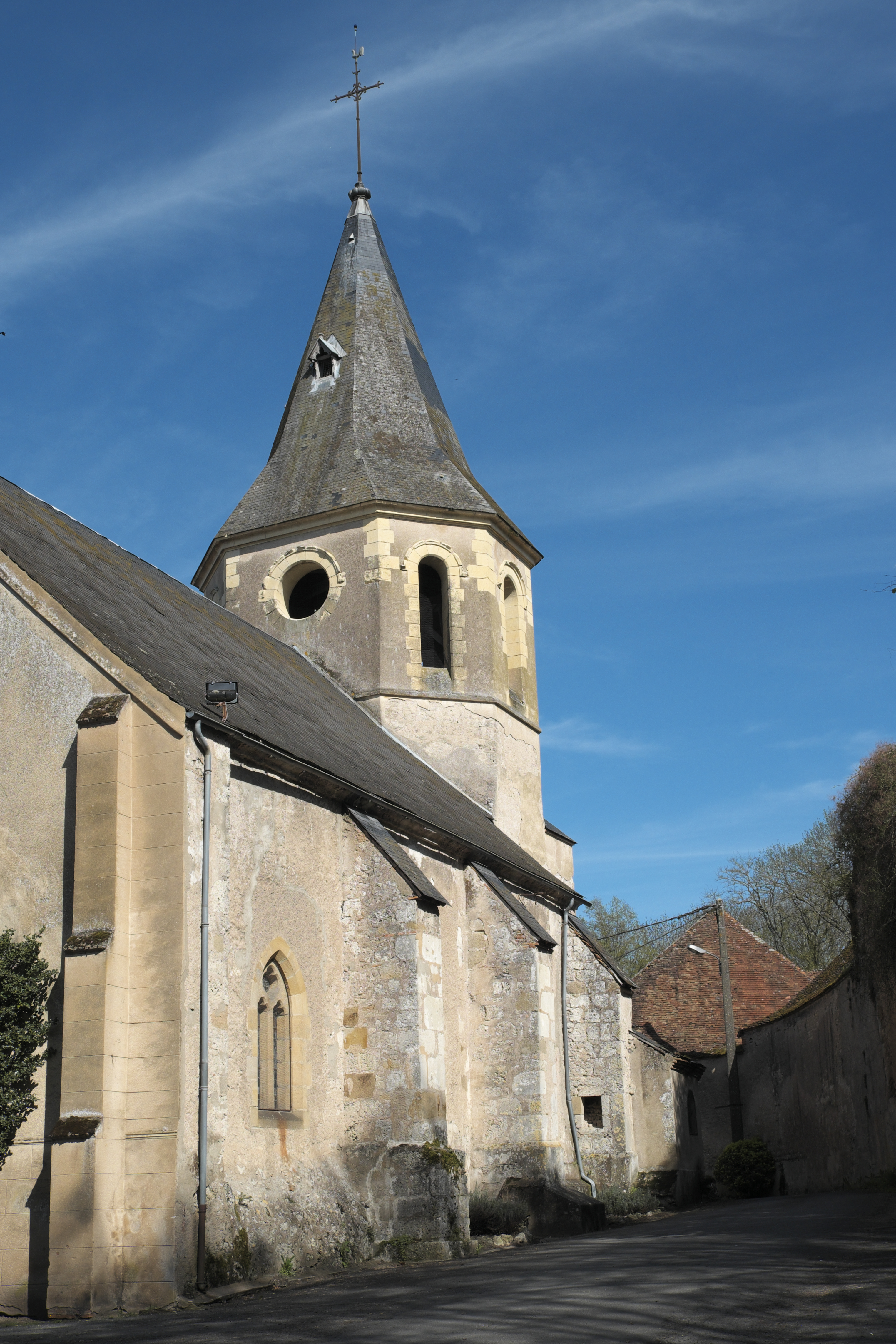 Katholische Pfarrkirche Saint-Hippolyte in Jaligny-sur-Besbre im Département Allier (Auvergne-Rhône-Alpes/Frankreich)